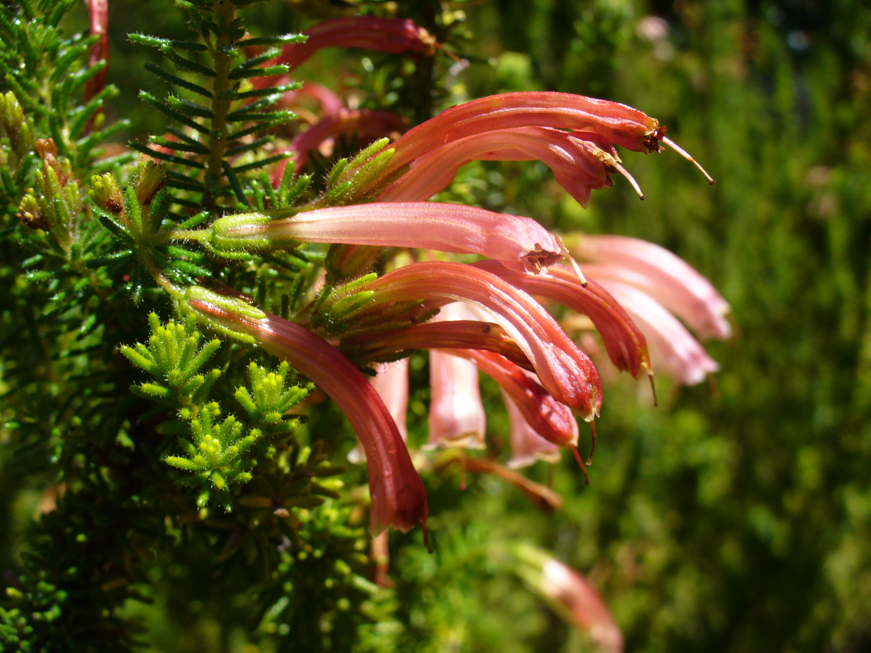 Kirstenbosch Gardens Cape Town